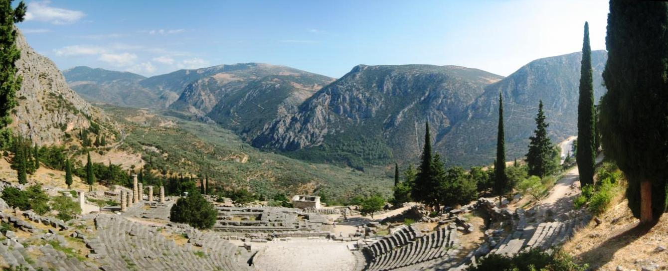 Panorama Delfa